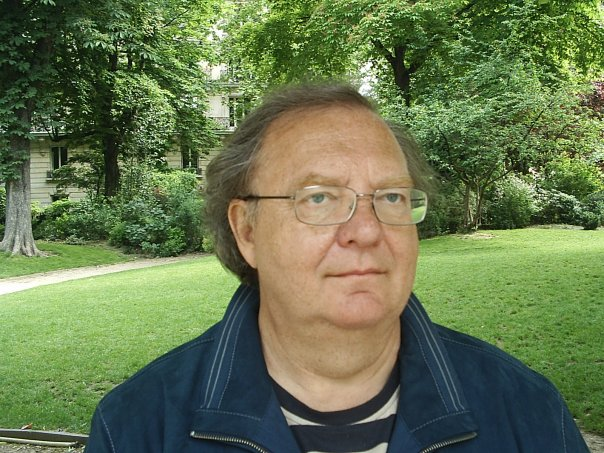 Režisér